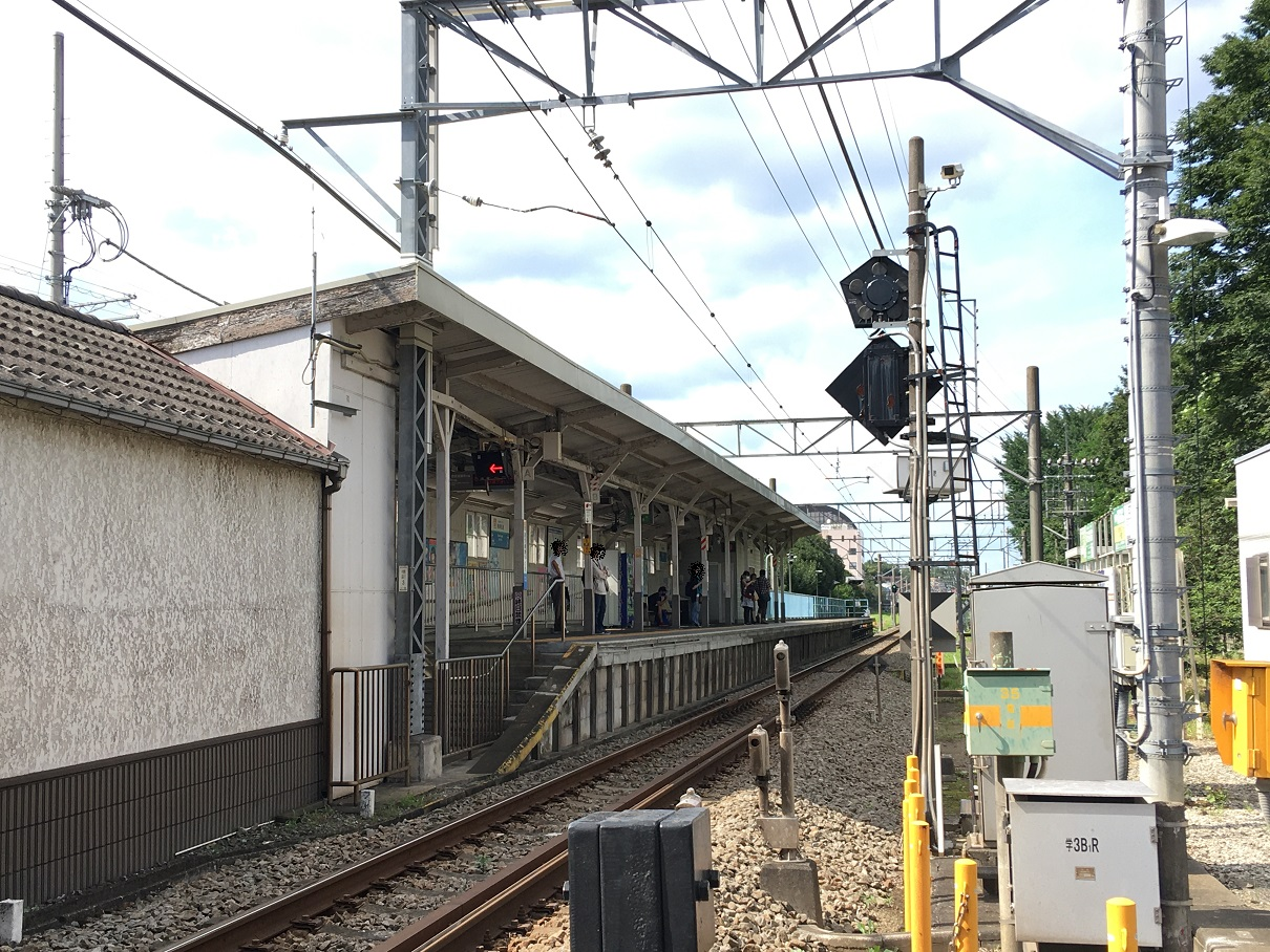 青梅街道駅ホーム